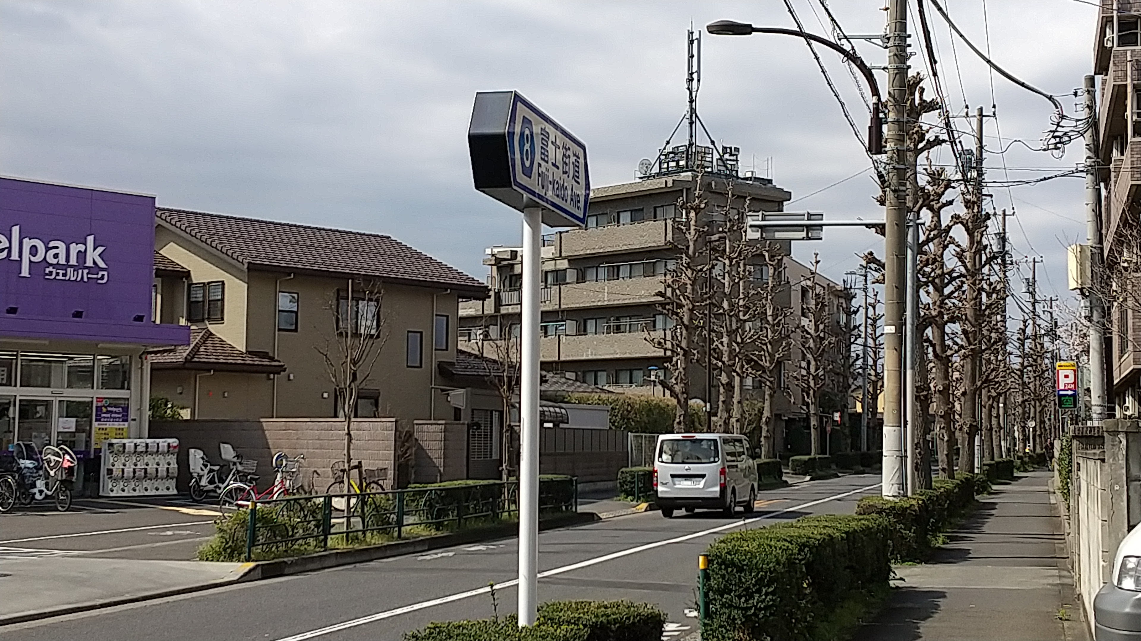 練馬区高塚にて